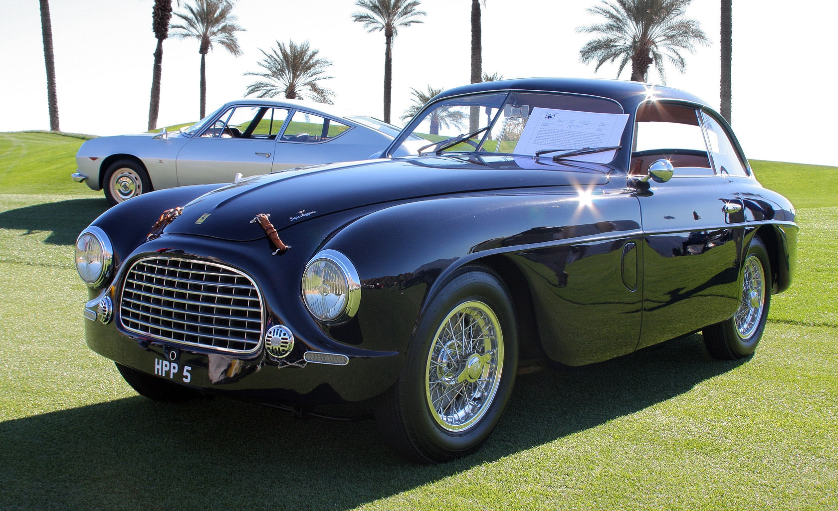 2011 Desert Classic, La Quinta, CA